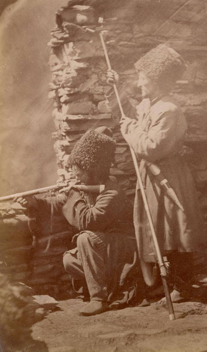 Кистинец